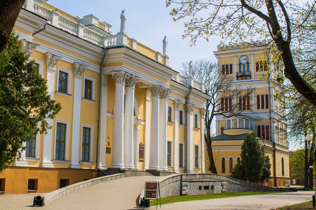 Палацава-паркавы комплекс ў Гомелі. Палац з вежай